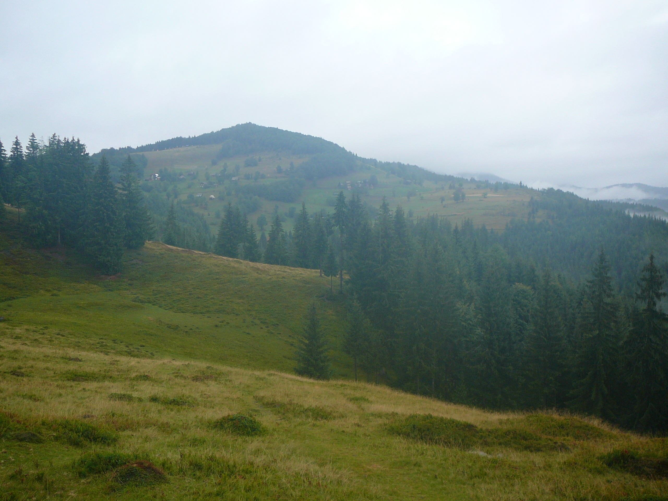 Garda de Sus